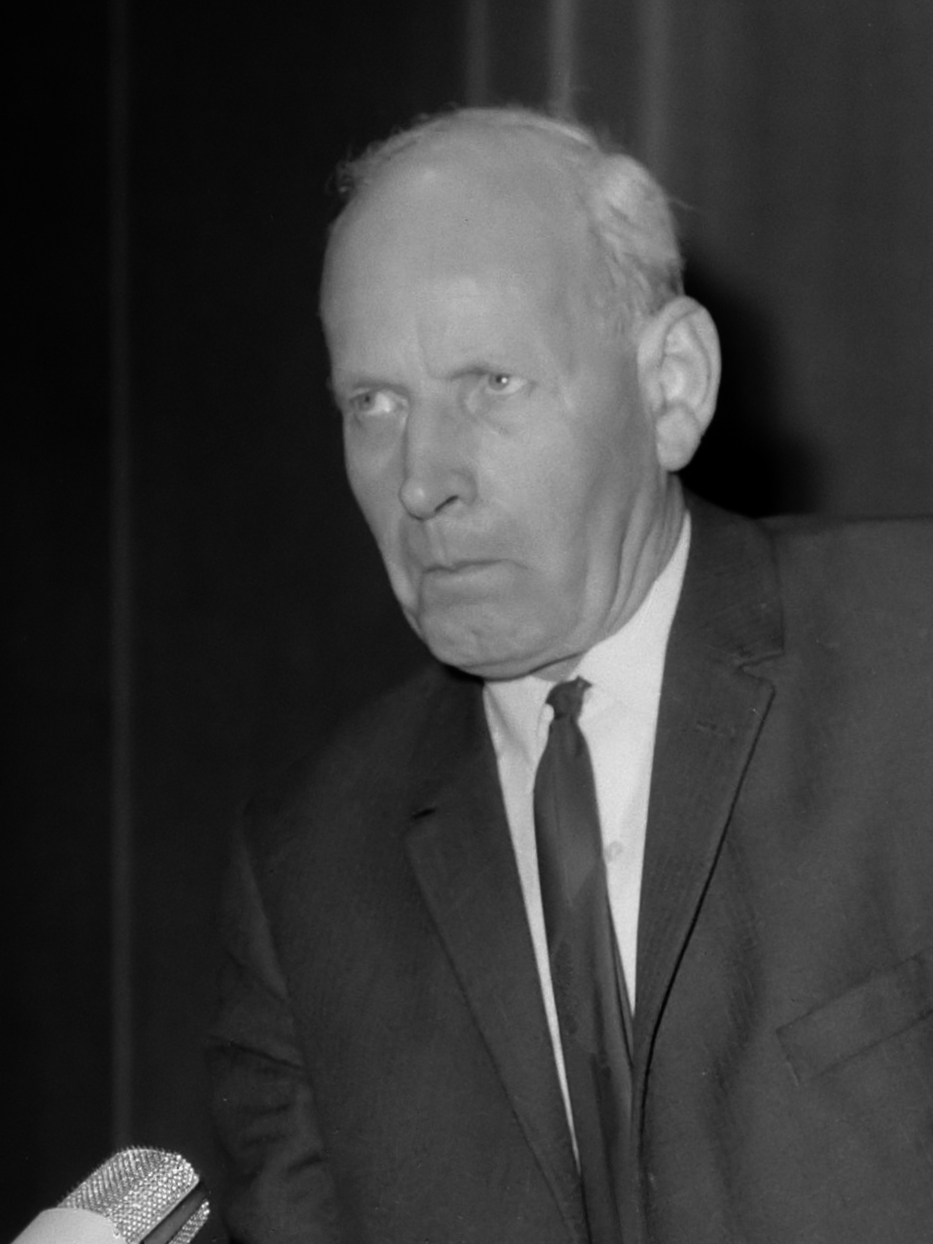 De protestant christelijke bouwvakarbeiders van het N.C.B. (afdeling van het C.N.V) hebben een bijeenkomst gehouden in het RAI-Congrescentrum te Amsterdam. Het N.C.B. heeft niet meegedaan aan de demonstratie in Den Haag. De voorzitter van het C.N.V. de heer J. van Eibergen aan het woord 2 april 1968